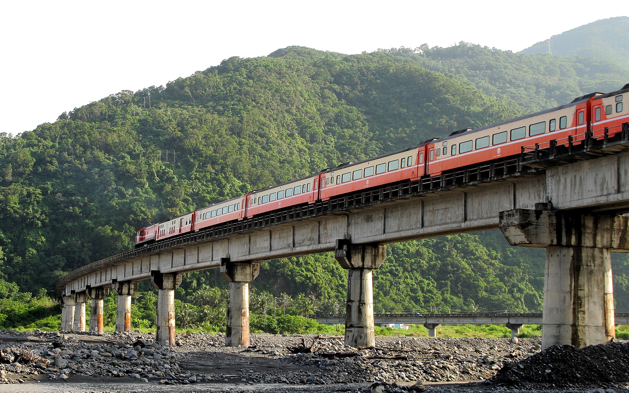 金崙溪鐵橋